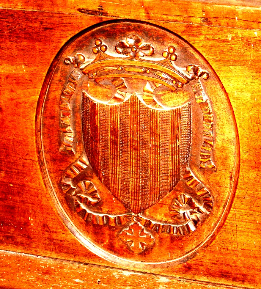 Lo Stemma dei Marchesi Scarampi su panca da chiesa lignea. Pres. Sec XVII